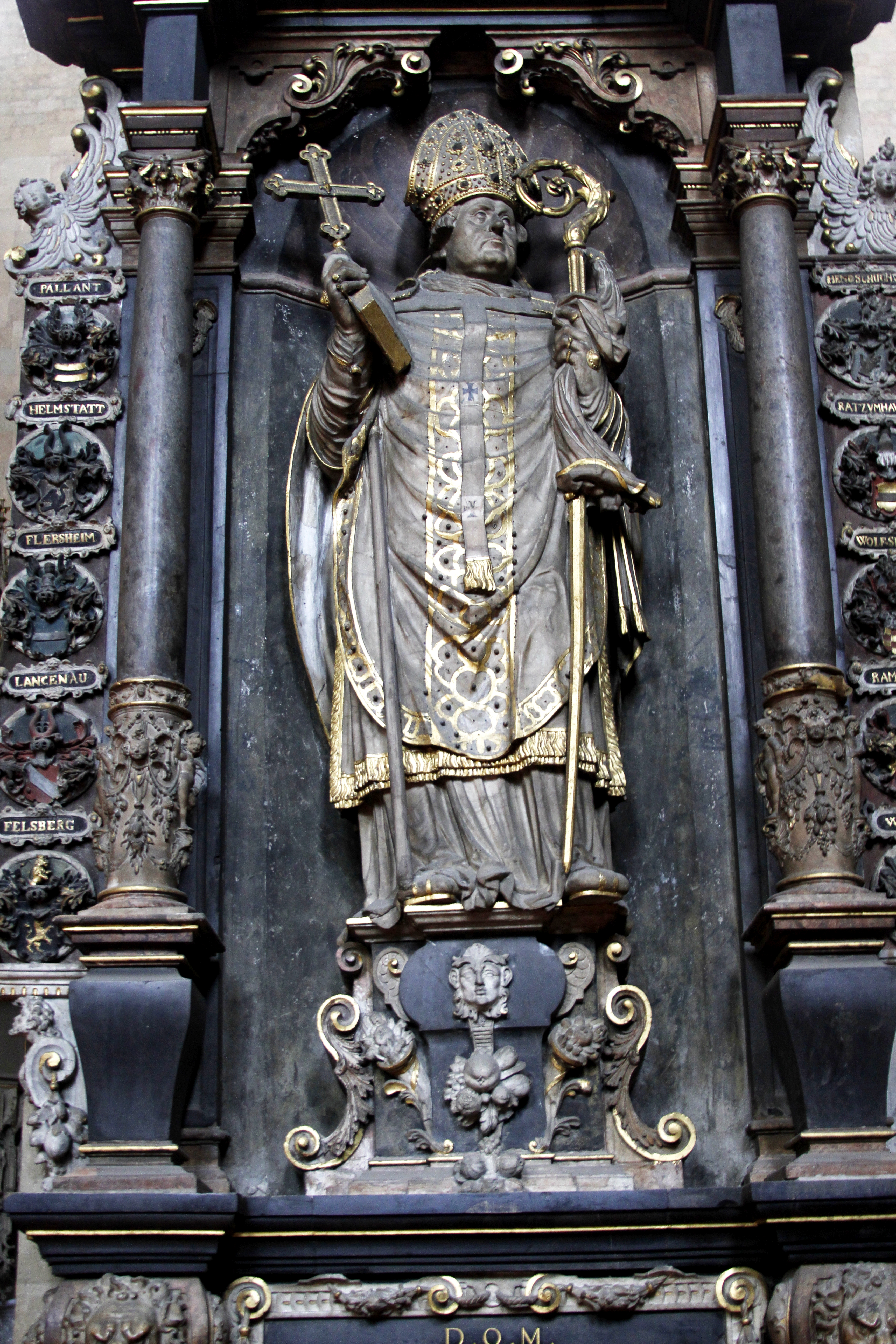 Mainz Cathedral - Mainz - Germany